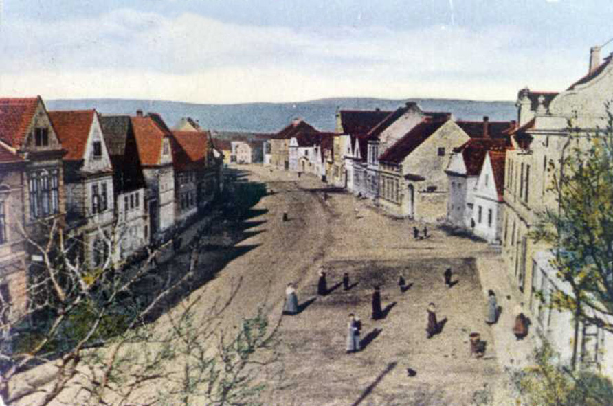 Ehemaliges Dorf Třebušice (Triebschitz) bei Most (Brüx) in Tschechien.